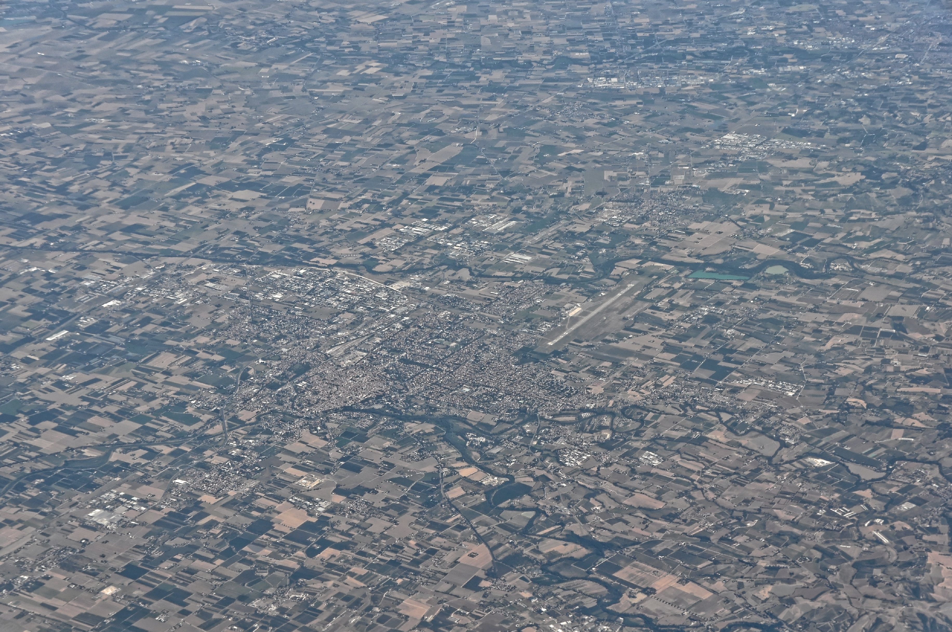 Bilder vom Flug -Rom-Düsseldorf-Hamburg 2013 Dieses Foto entstand in Zusammenarbeit mit Stadtbesichtigungen.de Die Seiten Stadtbesichtigungen.de, der dazugehörige Reise Blog sowie die Facebookseite: Stadtbesichtigungen Rom dürfen dieses Bild für Ihre Veröffentlichungen ohne den Hinweis auf Wikipedia, Commons bzw der Lizenz verwenden. Die Verantwortlichen habe von mir (Ra Boe) die Originaldaten zur freien Verfügung übermittelt bekommen.